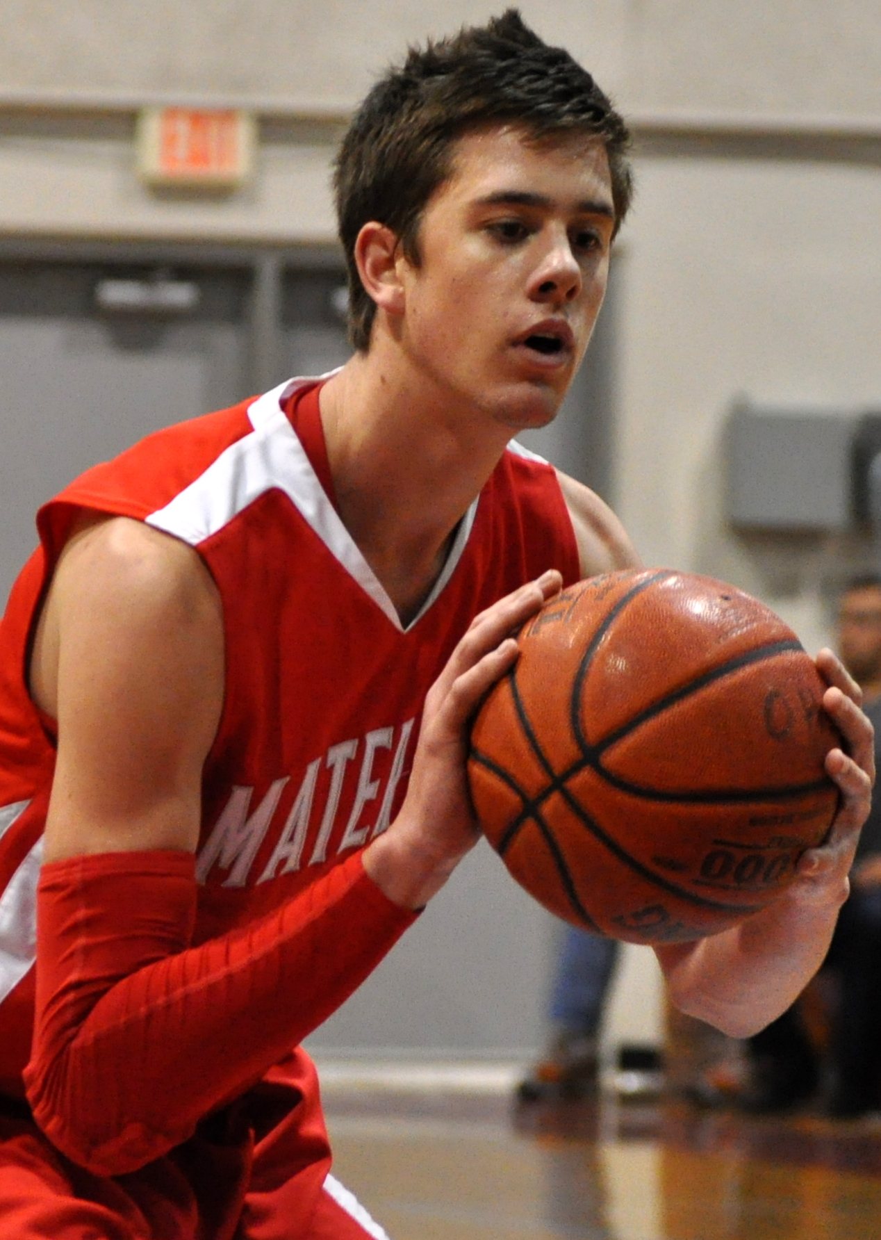 Katin Reinhardt